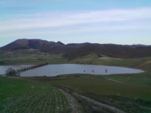 Lago di Arvello invernale